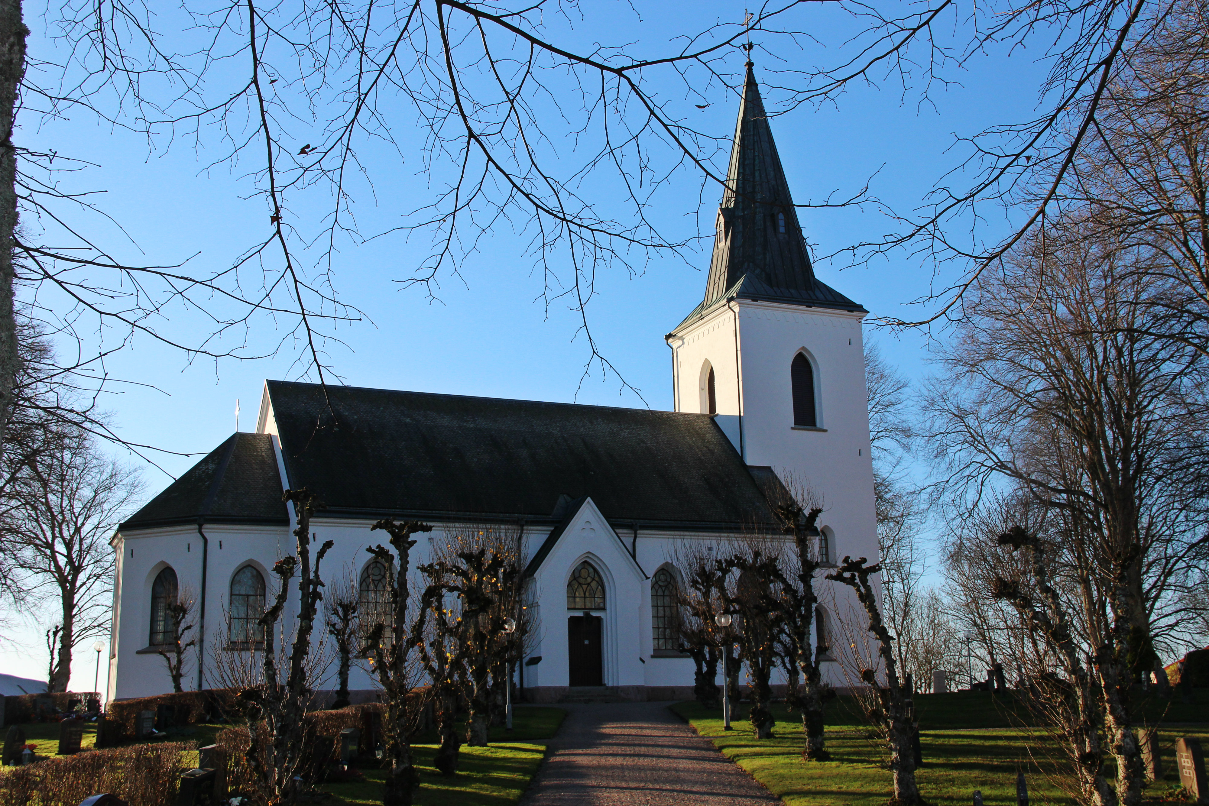 Longs kyrka (Long 8:1)